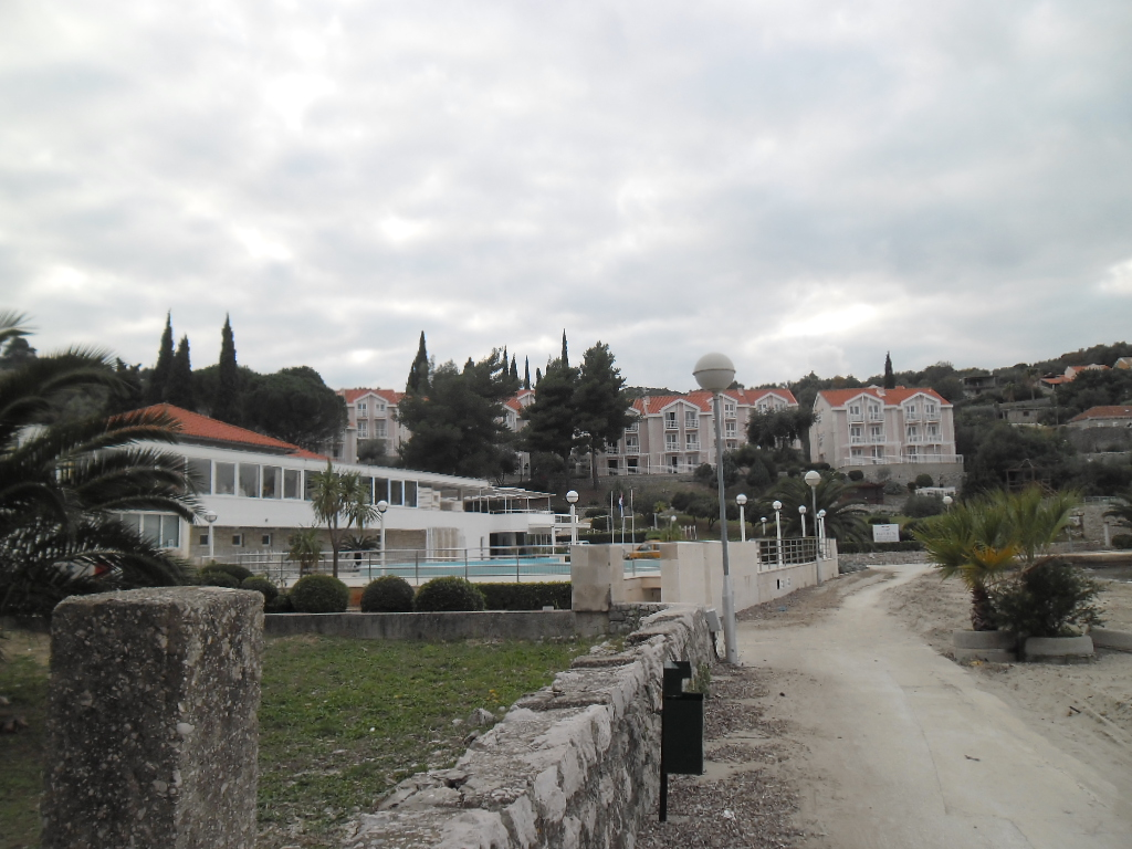 hotel na Koločepu